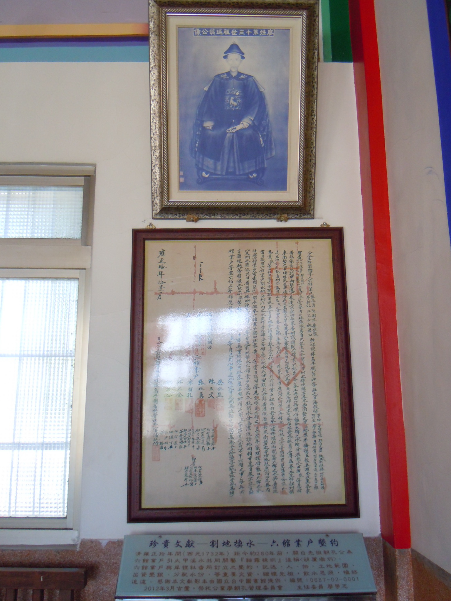 中文（台灣）: 清武家廟位在臺中市西屯區港尾里清武巷1號。